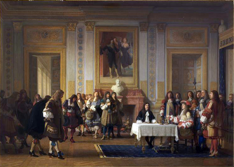 Huile sur bois 63 cm x 89 cm. Musée d'Orsay.